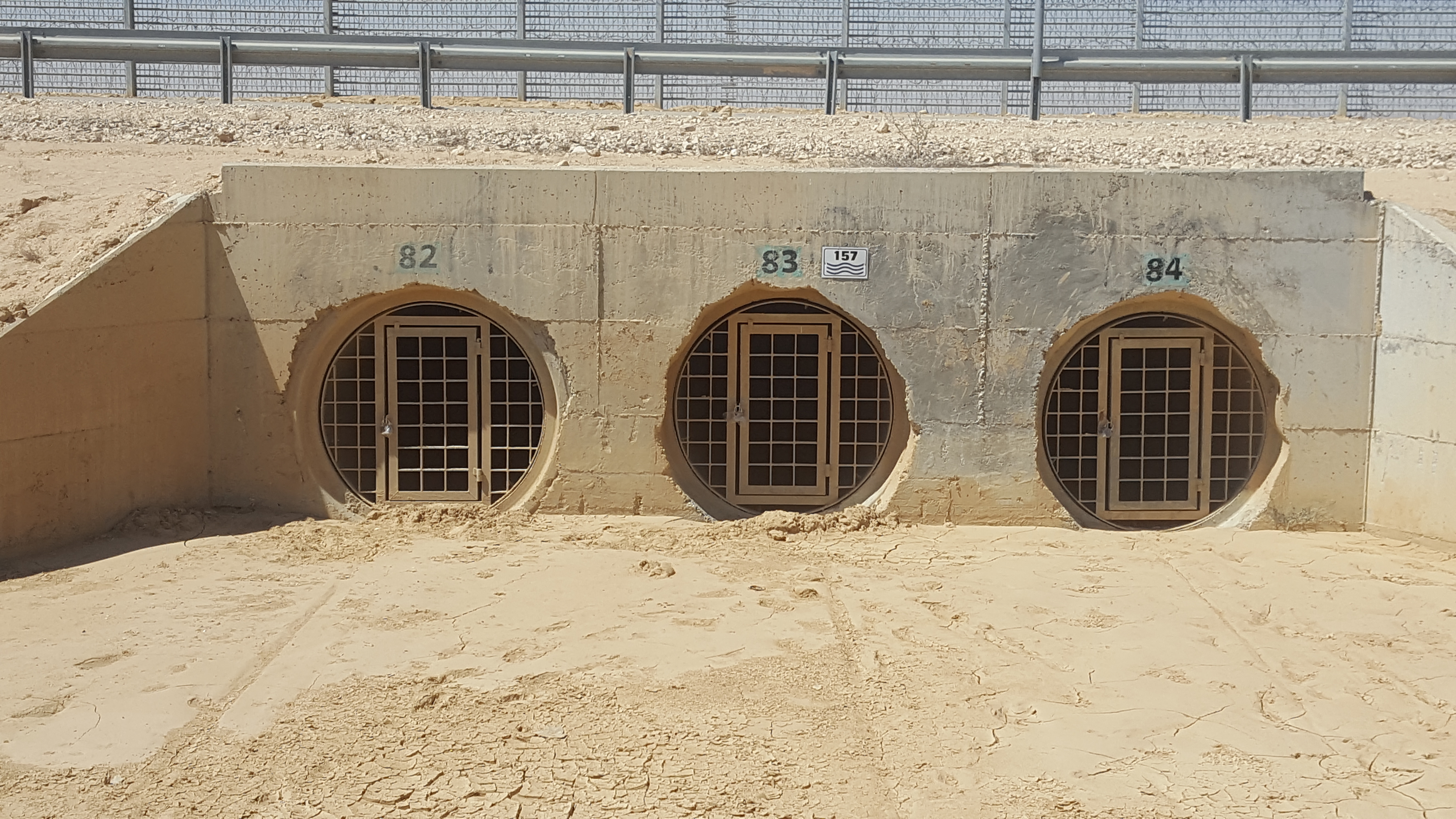 מעביר מים תחת כביש המערכת בגבול מצרים